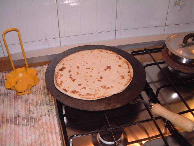 Je suis l'auteur de cette photo prise en avril 2007 à Macerone (commune de Cesena, Emilie-Romagne, Italie).